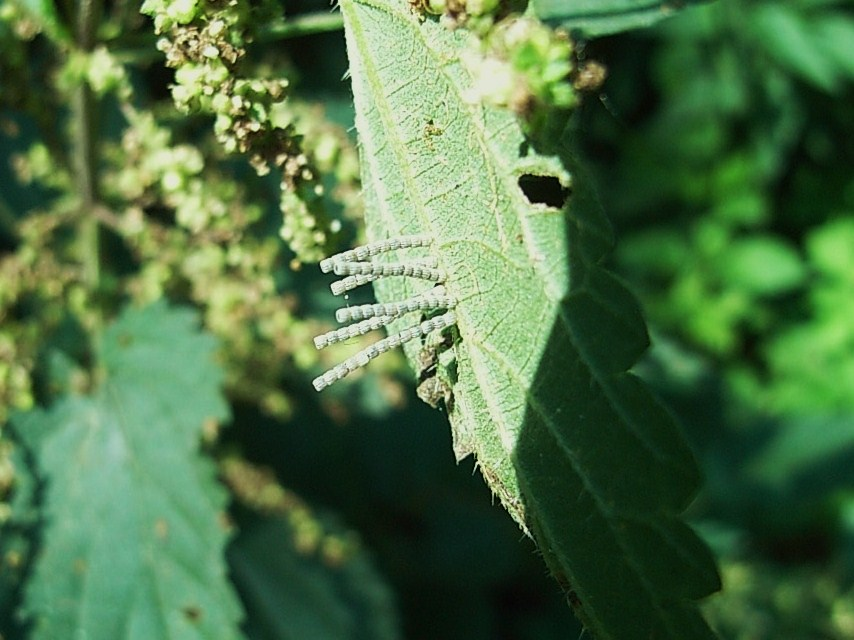 Landkärtchen-Eier auf Brennnessel